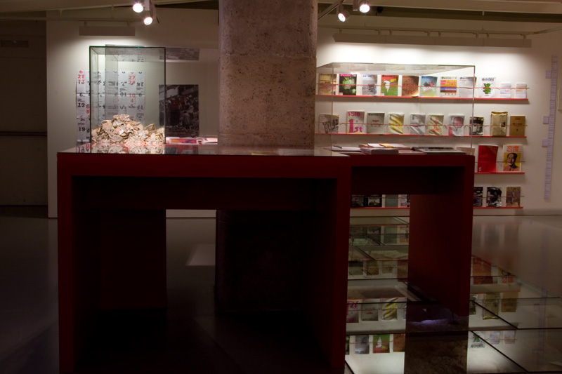 El Llibre i el Maó. Exposición Instituto Confucio